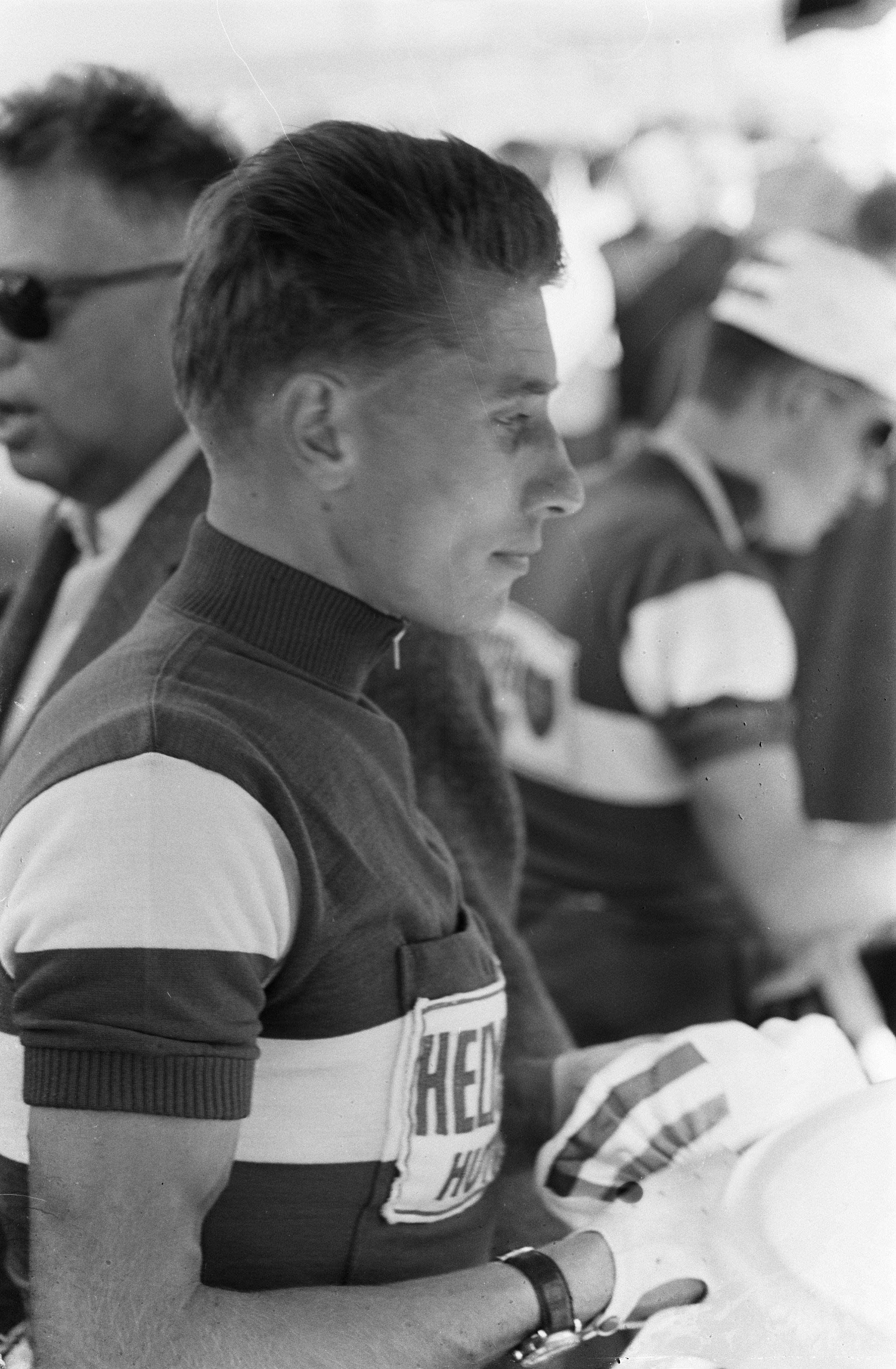 Collectie / Archief : Fotocollectie Anefo Reportage / Serie : Tour de France 1961 Beschrijving : [Jacques Anquetil] Datum : 23 juni 1961 Locatie : Frankrijk Trefwoorden : wielrenners Persoonsnaam : Anquetil, Jacques Fotograaf : Fotograaf Onbekend / Anefo, [onbekend] Auteursrechthebbende : Nationaal Archief Materiaalsoort : Negatief (zwart/wit) Nummer archiefinventaris : bekijk toegang 2.24.01.05 Bestanddeelnummer : 912-6732